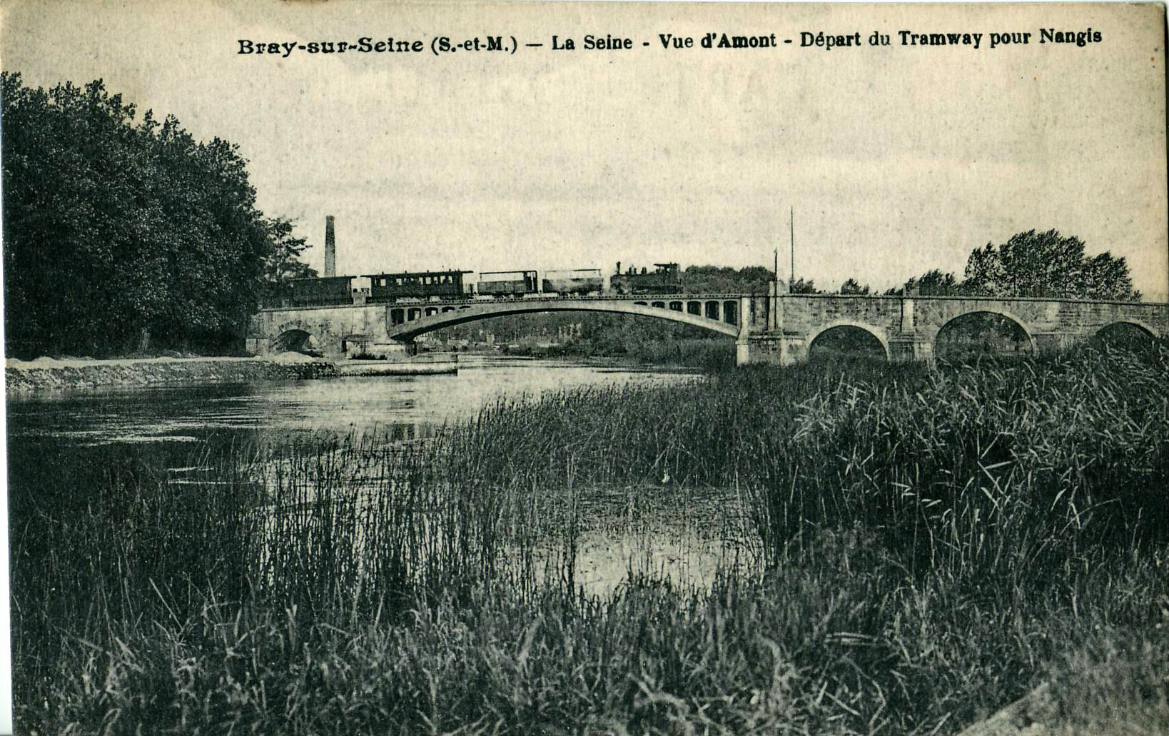 Care postale ancienne éditée par PB : BRAY-SUR-SEINE - La Seine - Vue d'Amont - Départ du Tramway pour Nangis. Ligne Jouy-le-Châtel - Bray-sur-Seine des Chemins de fer départementaux de Seine-et-Marne, exploitée par la SE